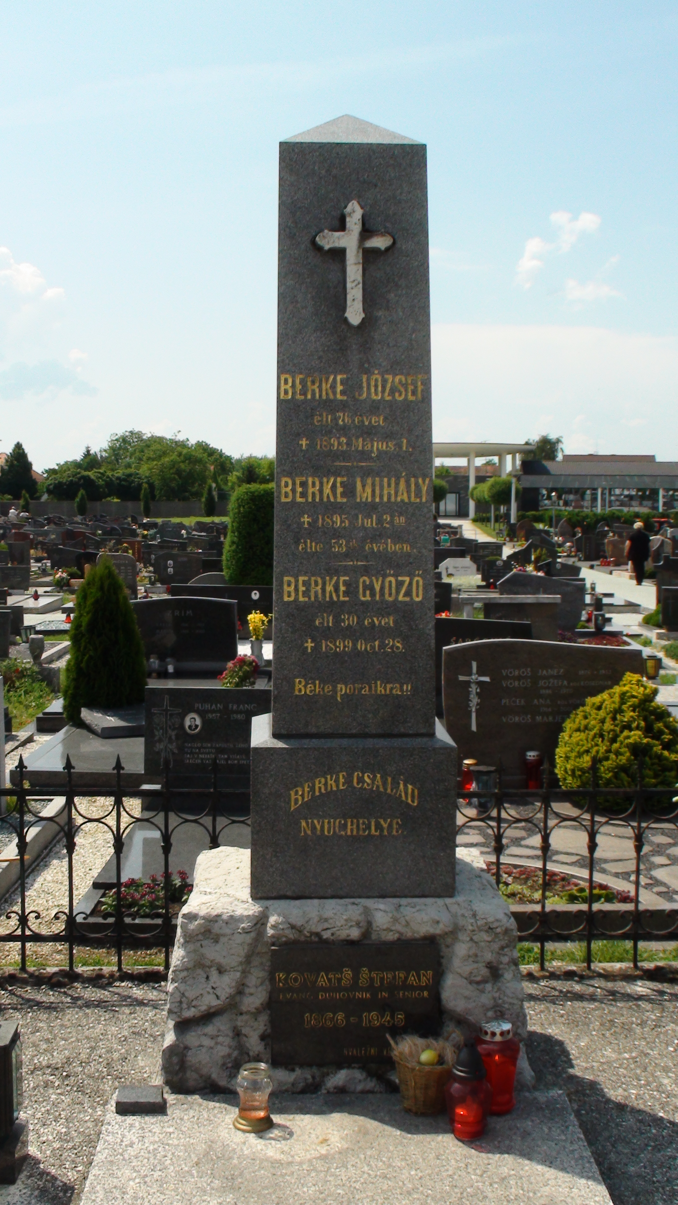 Grobnica družine Berke na pokopališču v Murski Soboti